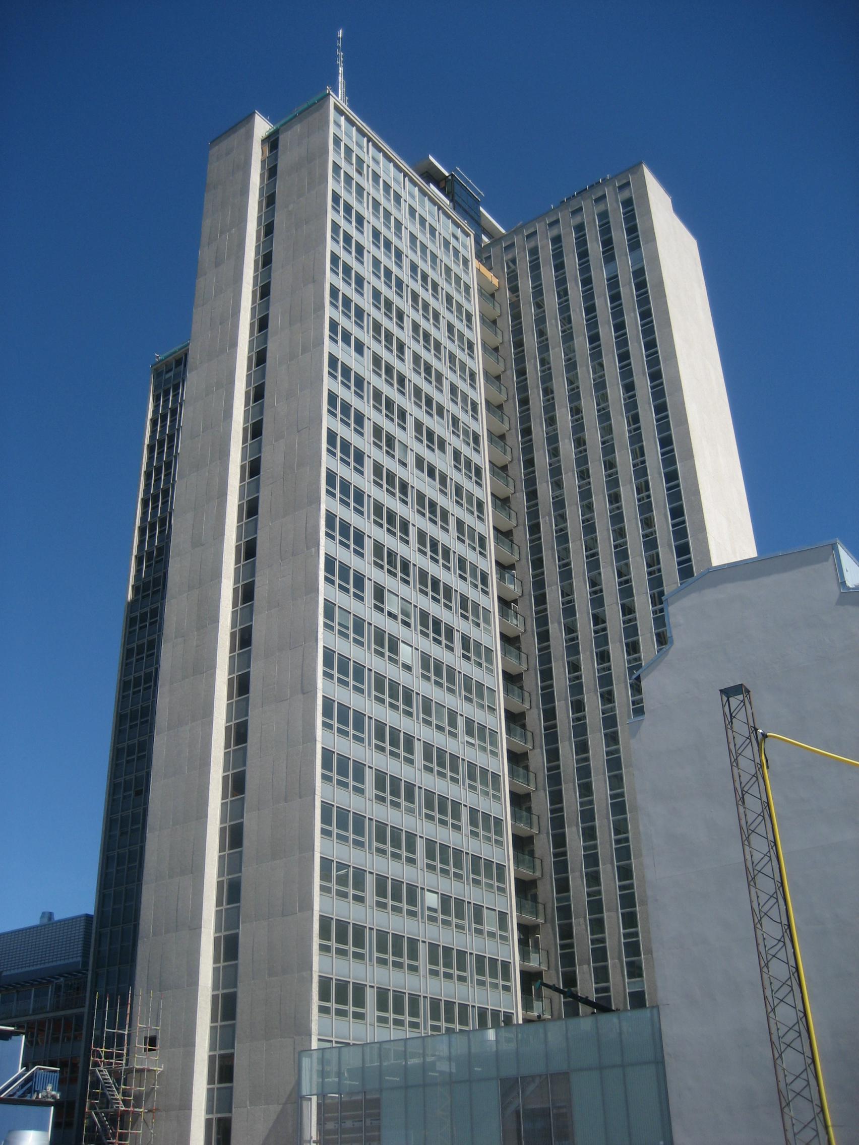 The scyscraper Skatteskrapan in Stockholm, Sweden.